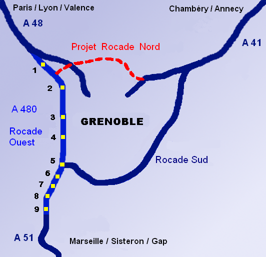 Rocade Ouest à Grenoble avec ses échangeurs numérotés